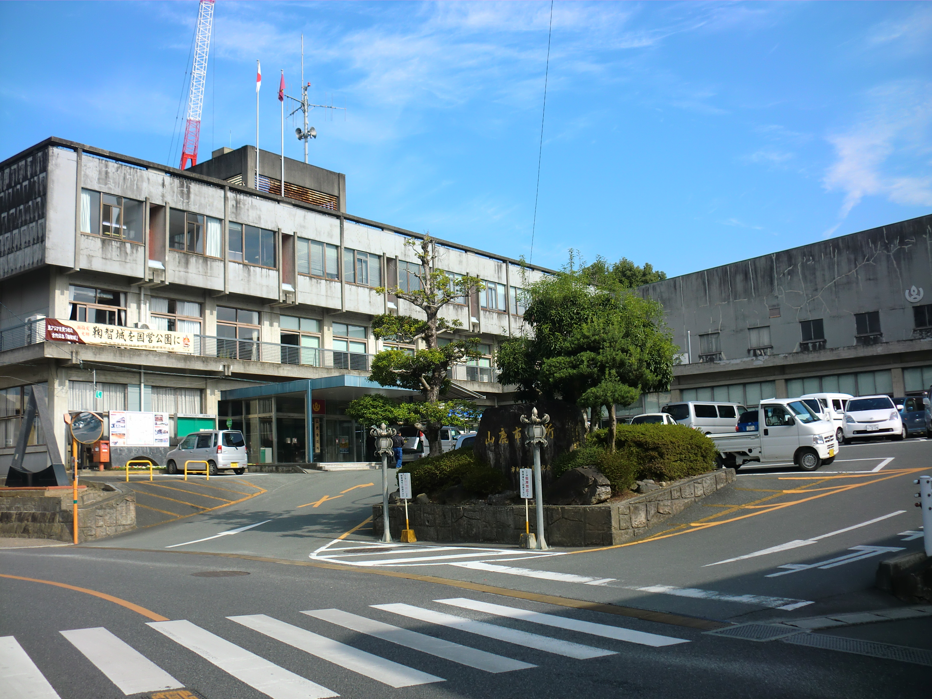 熊本県山鹿市にある山鹿市役所